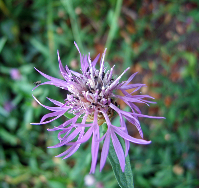 Flora Biogradske gore